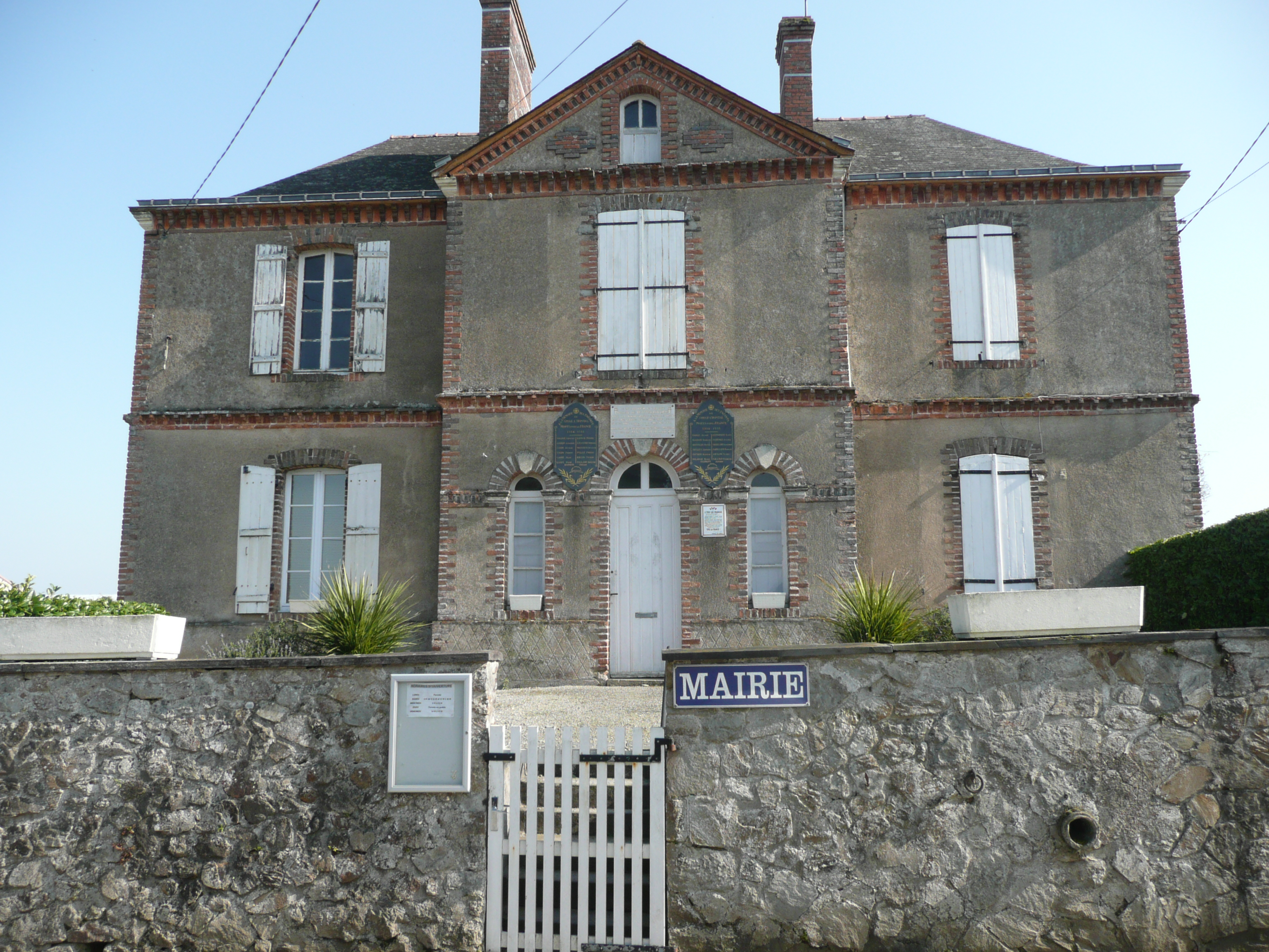 Mairie de Grugé-l'Hopital